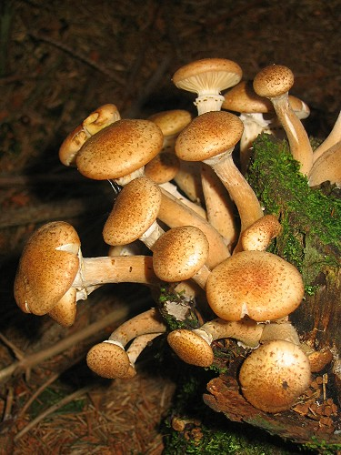 Gemeiner Hallimasch (Böhmen, Jedlova)